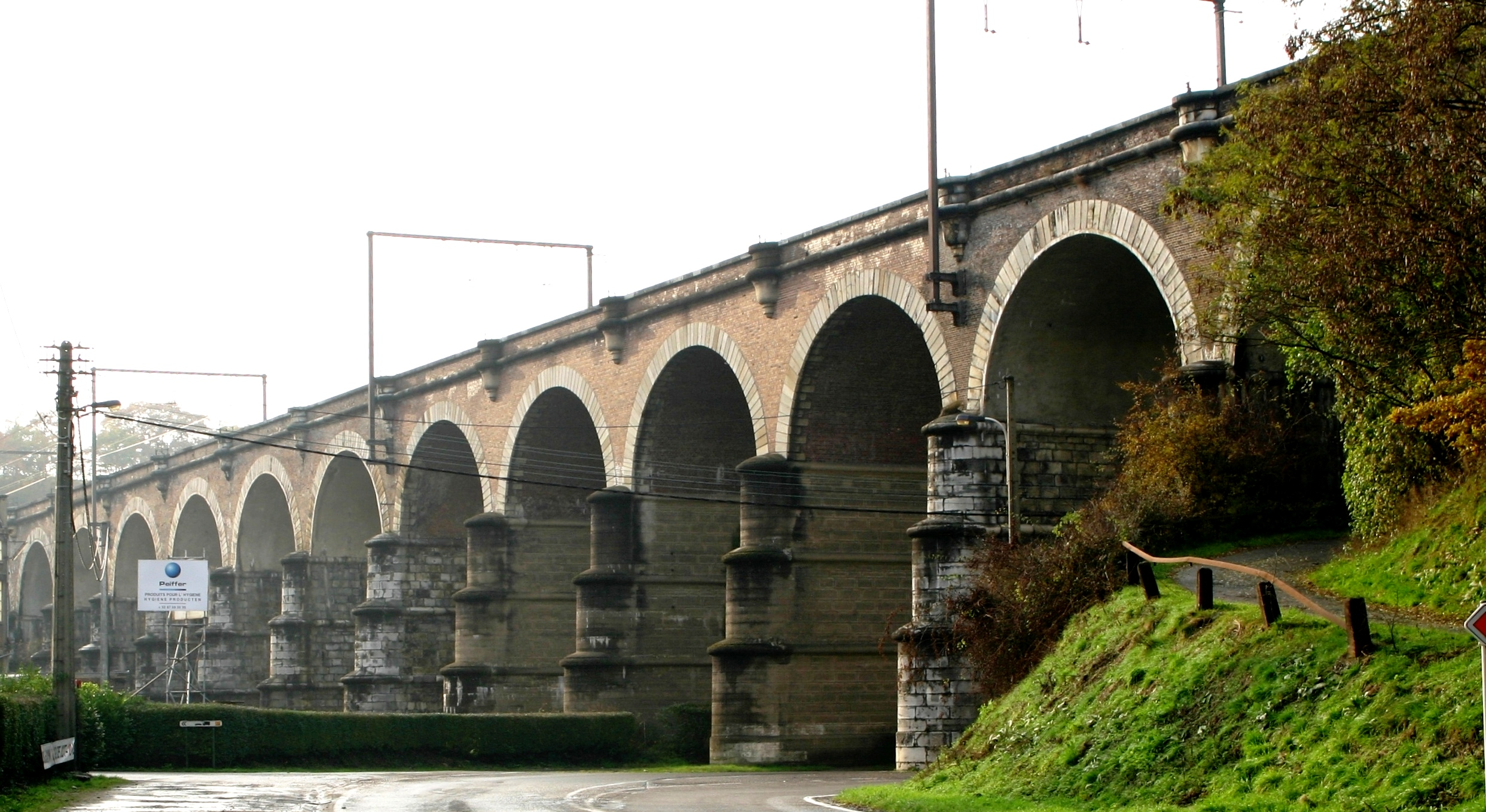 Viaduc vun Dolhain iwwer der Nationalstrooss N61